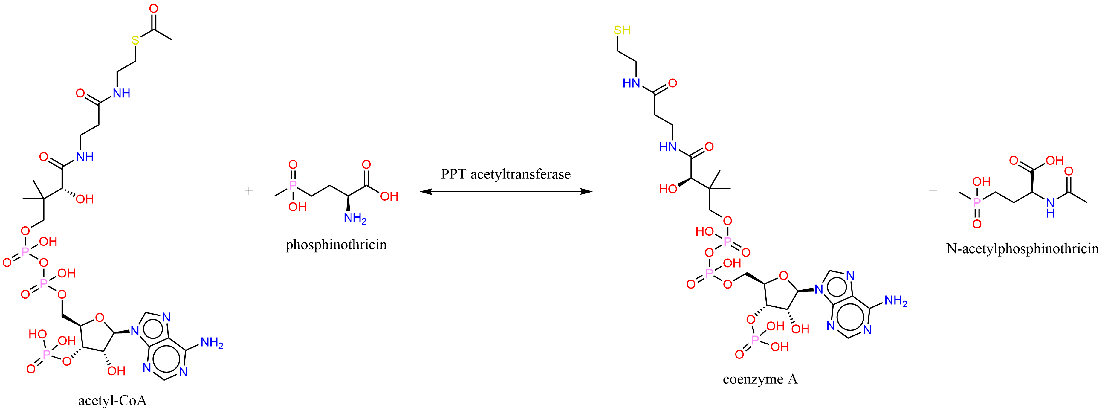 Acetyl-CoA:phosphinothricin N-acetyltransferase. Action of the PPT acetyltransferase.